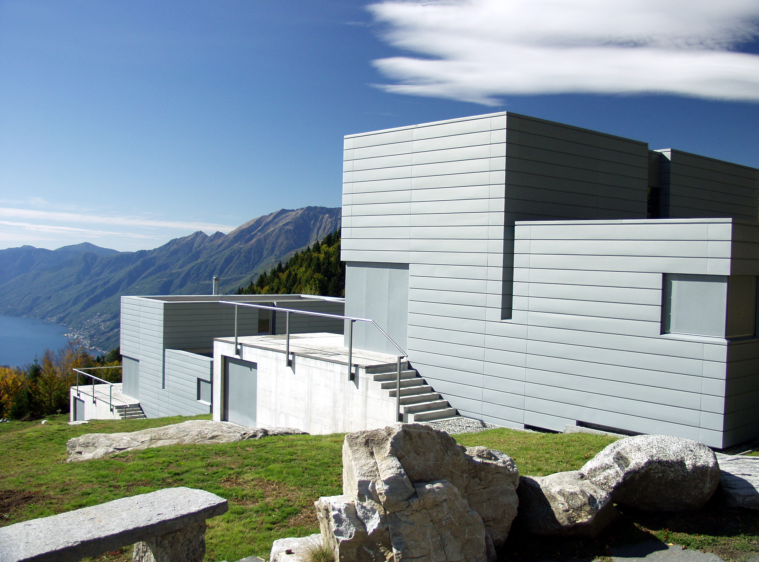 Wohnhäuser von Mario Botta auf Cardada (Locarno), erbaut im Jahr 2002